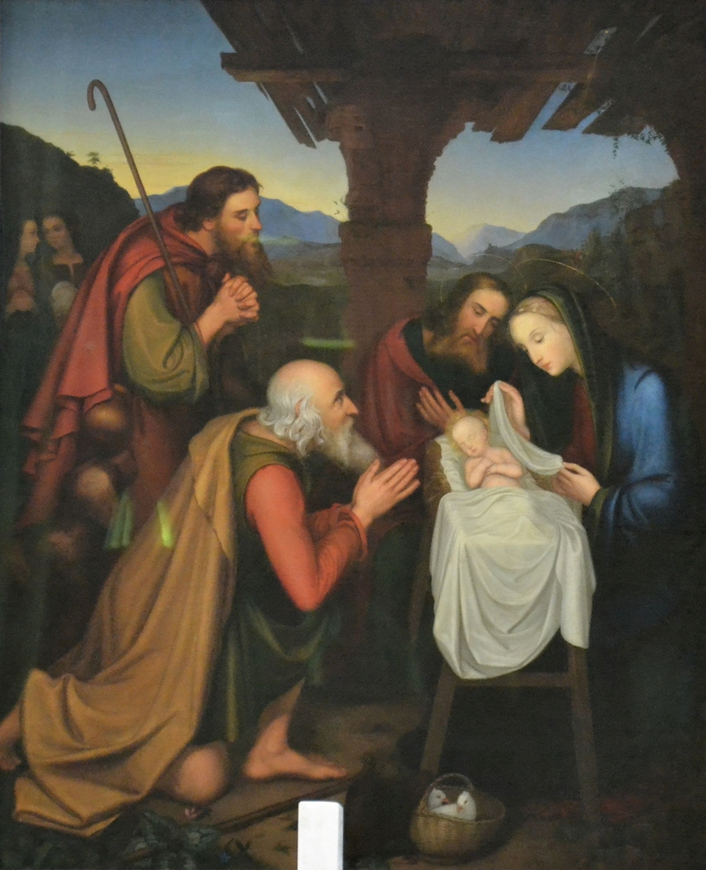 Original des Künstlers in der Friedenskirche zu Essen-Steele